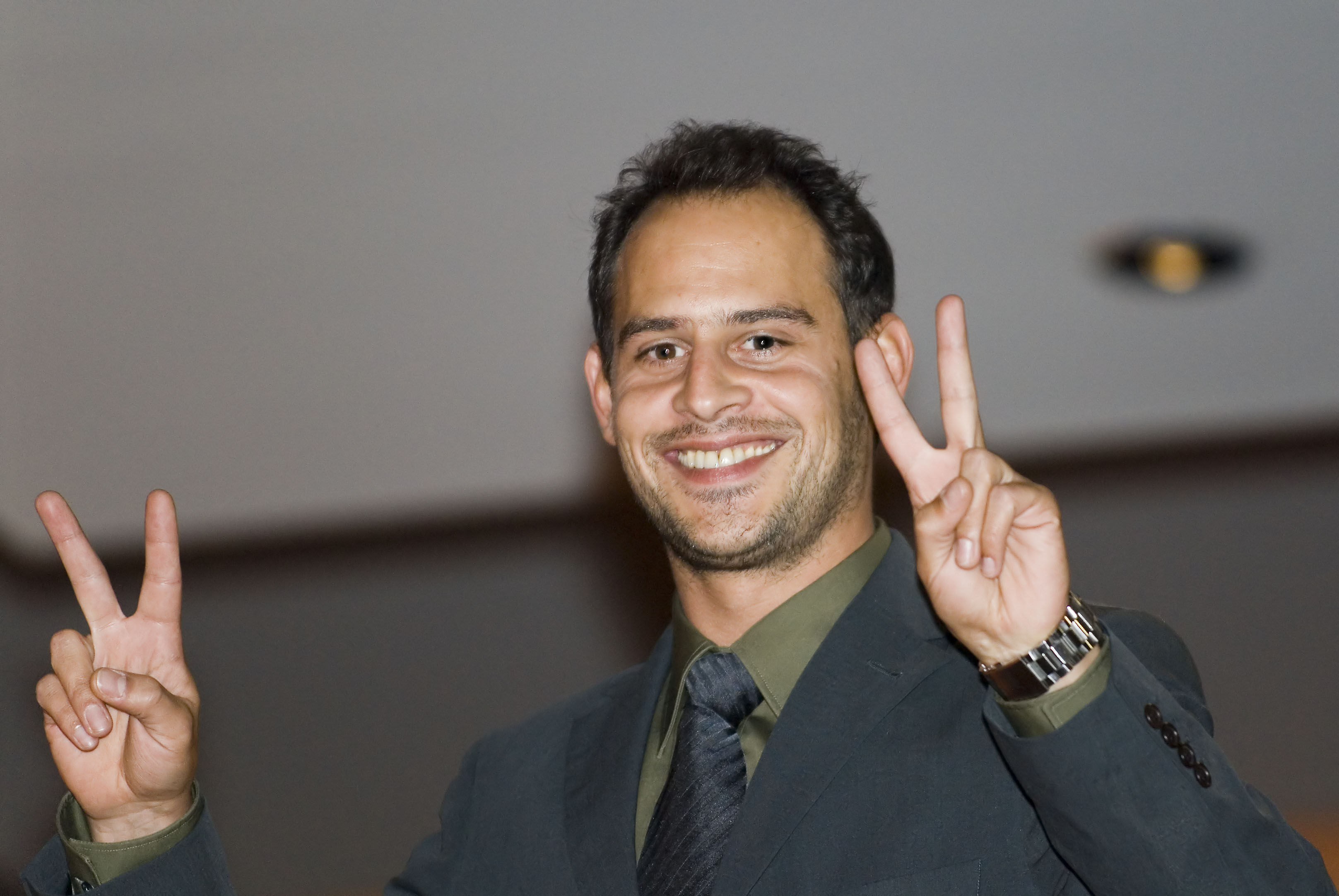 Moritz Bleibtreu Premiere of "The Walker" at the Berlinalepalace, Marlene-Dietrich-Platz, Berlin